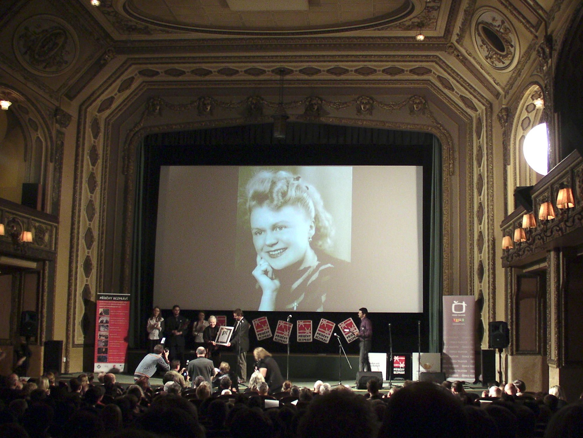 Ocenění laureátů třetího ročníku Cen Příběhů bezpráví za odvážné postoje a činy v období komunistického režimu. Hana Truncová přebírá plaketu od ředitele společnosti Člověk v tísni Šimona Pánka.